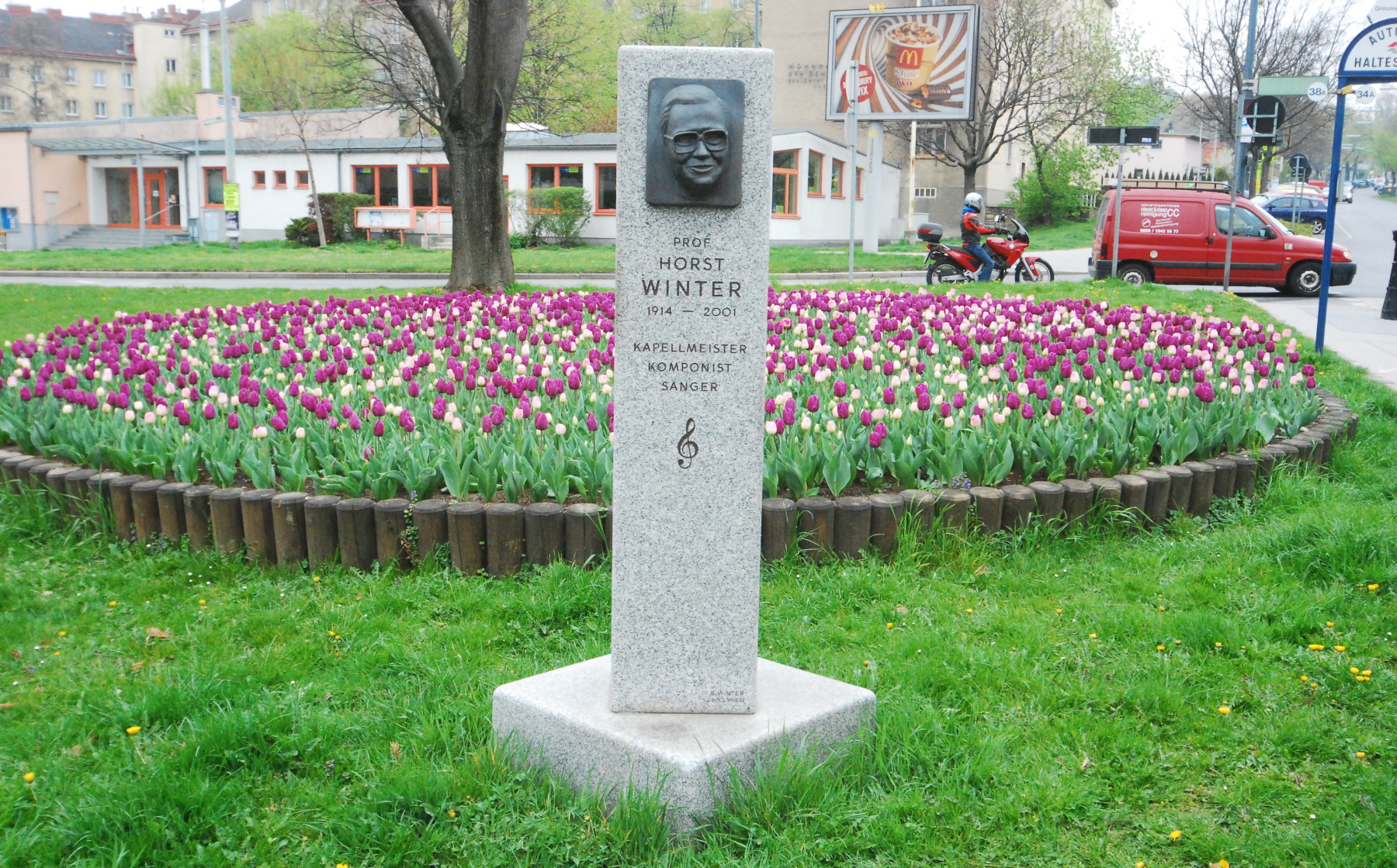 Denkmal für Horst Winter in der Heiligenstädter Straße in Wien-Döbling, 2002 von Reinhard Winter geschaffen.